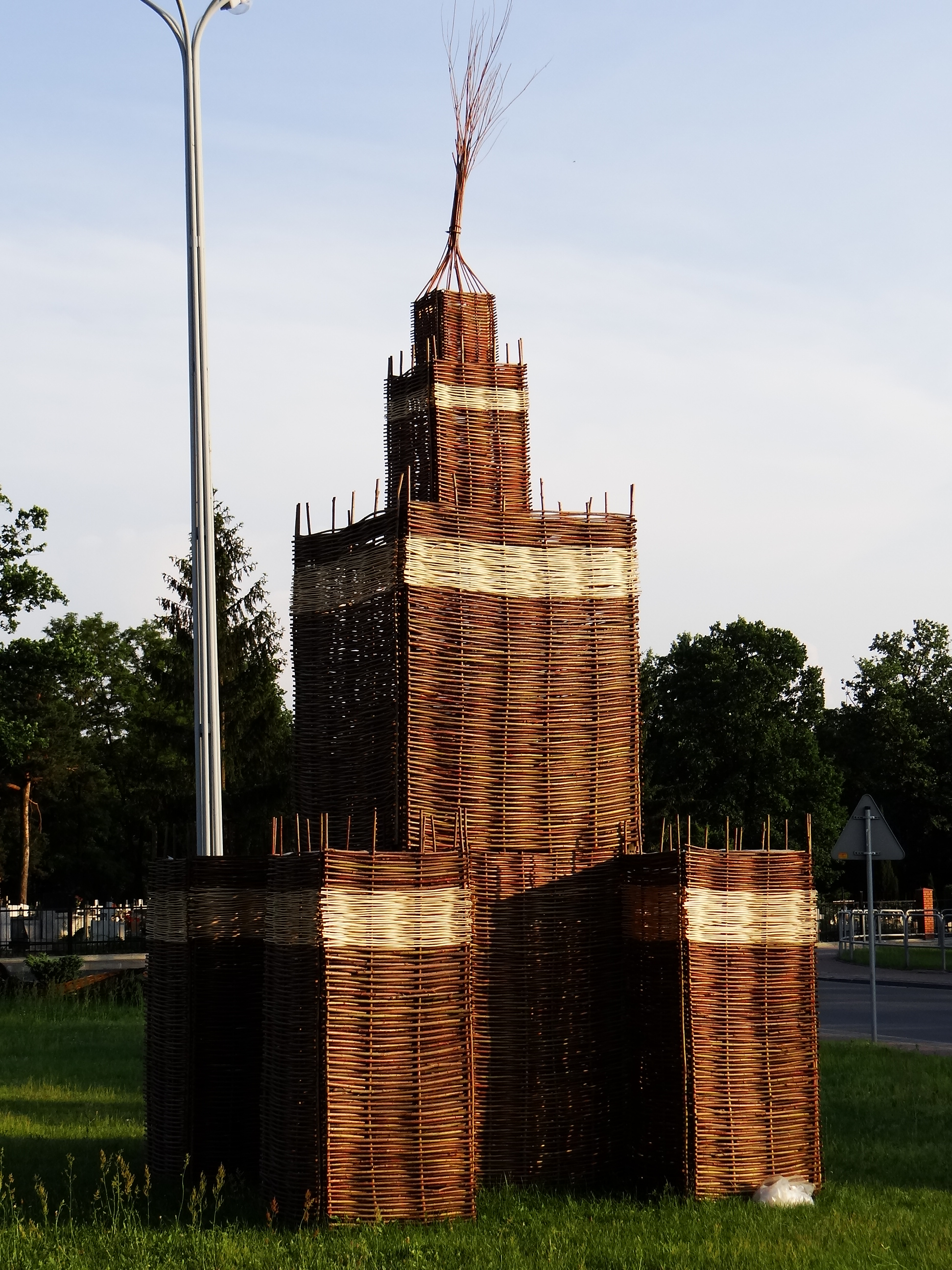 Zdjęcie wykonane w miejscowości Rudnik nad Sanem.